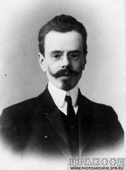 Депутат Государственной думы, приват доцент Московского народного университета Федор Федорович Кокошкин.